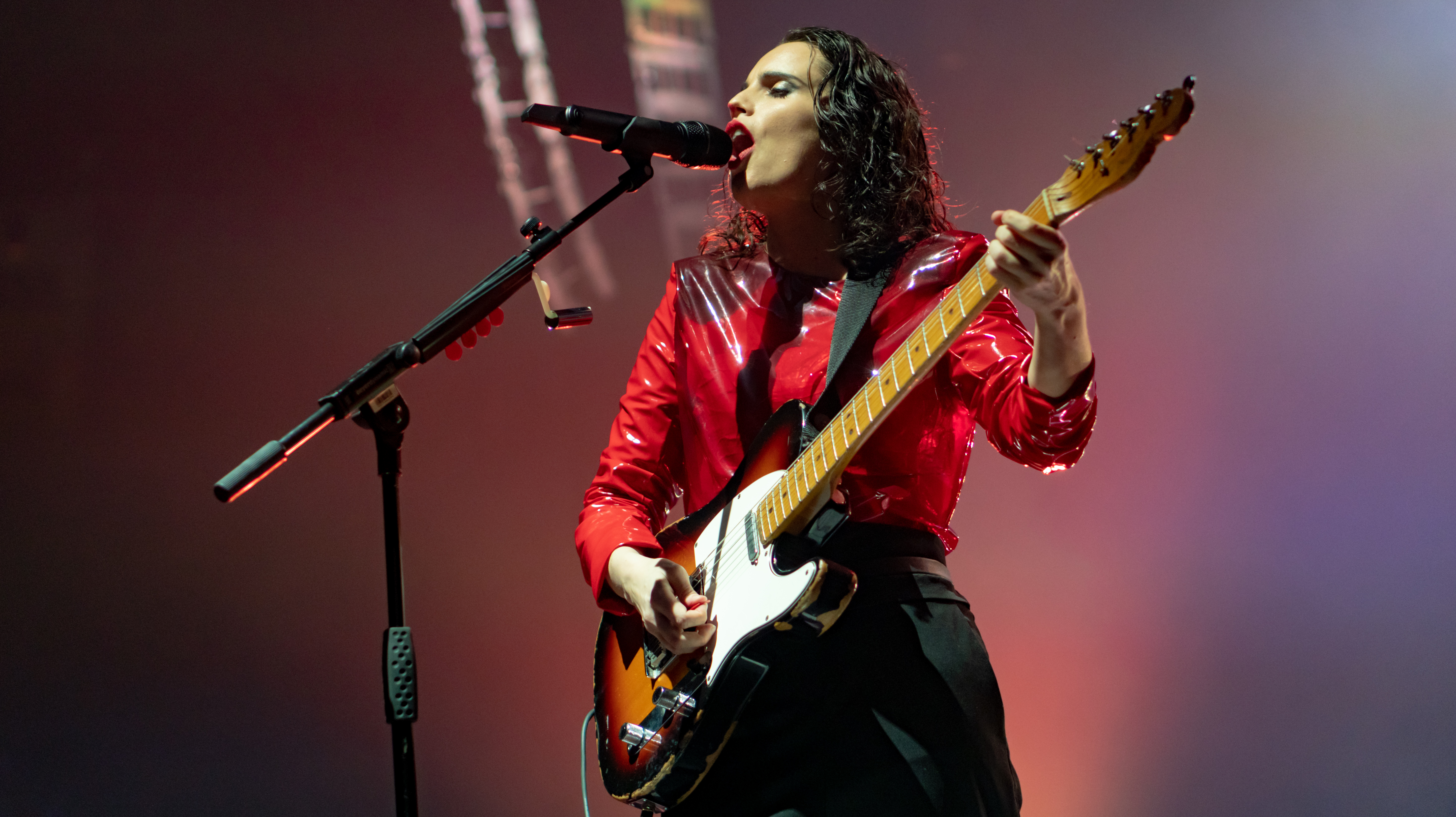 AnnaCalviRndhse070219-11